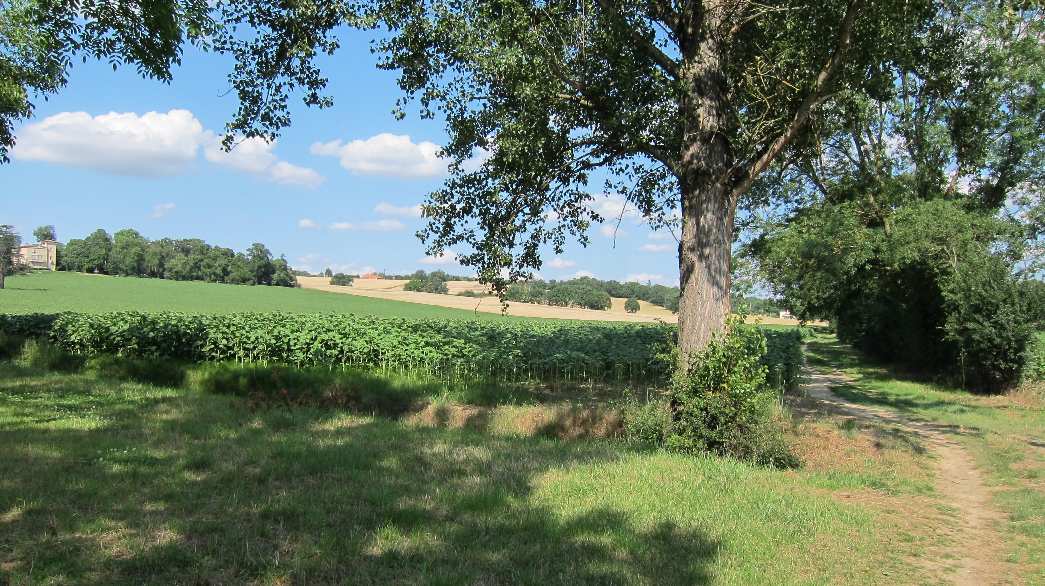 Montrabé (Haute-Garonne, Midi-Pyrénées, France) : La campagne de Beaupuy vue depuis Casties.